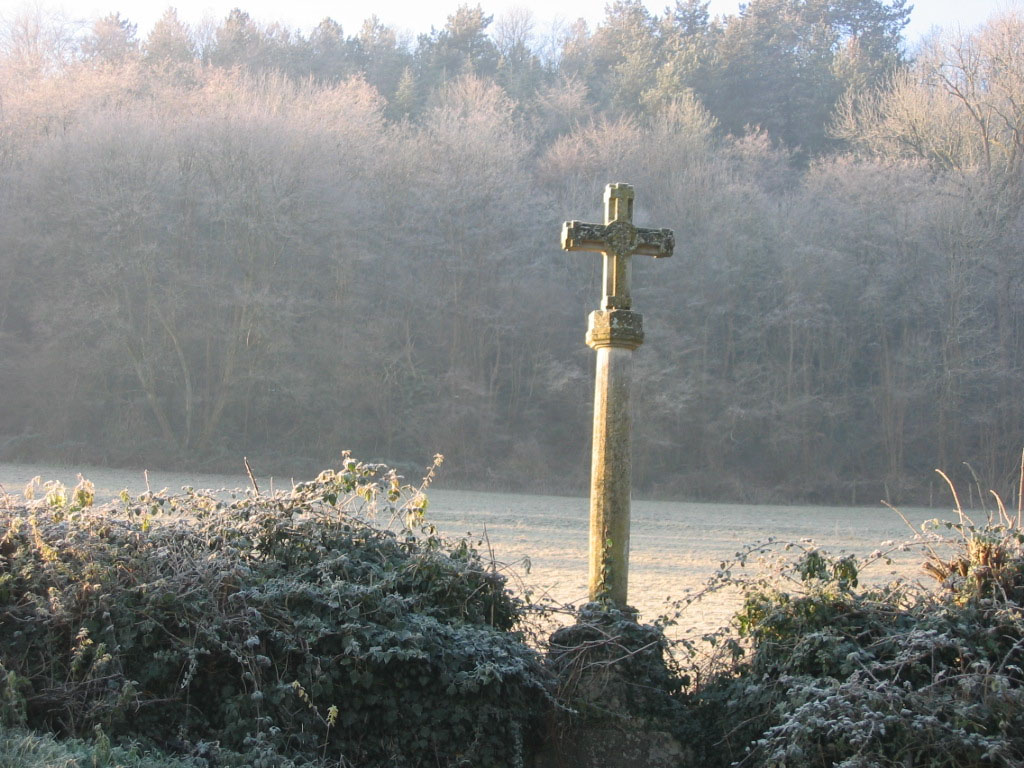 croix de Saint Jean à la sortie de Lucy(route de Girolles)